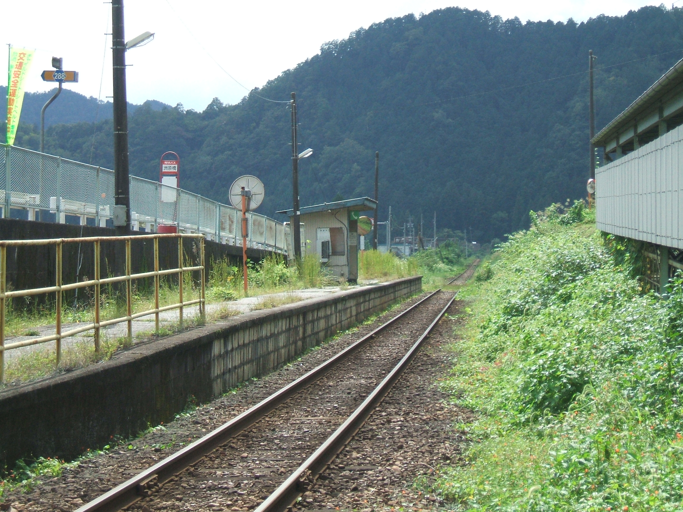 ホームの様子。美濃市方を望む。